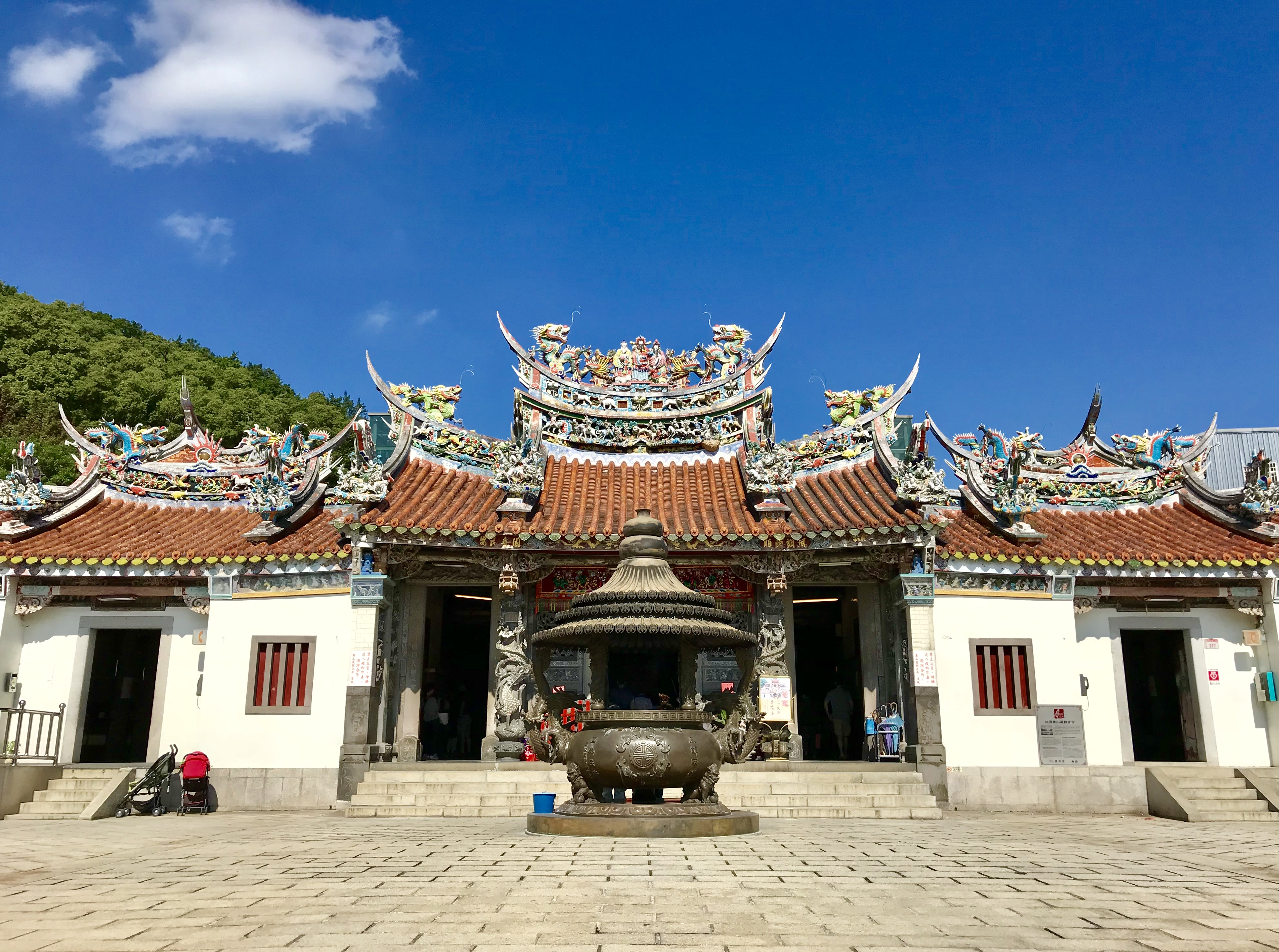 中文（台灣）: 壽山巖觀音寺正面近照